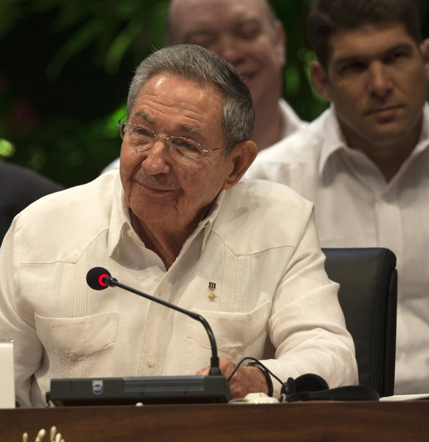 Raul Castro durante la Cumbre de la Asociación de Estados del Caribe-AEC.